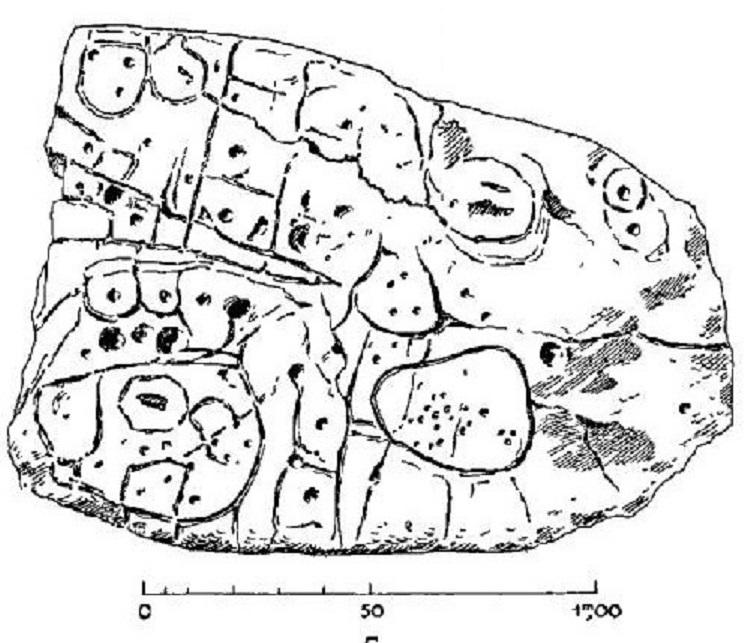 La pierre gravée de Sanct-Bélec en Leuhan (dessin de Paul du Chatellier, publié dans "Exploration des tumulus des Montagnes Noires (Finistère)", revue "Bulletin archéologique du Comité des travaux historiques et scientifiques", 1901)